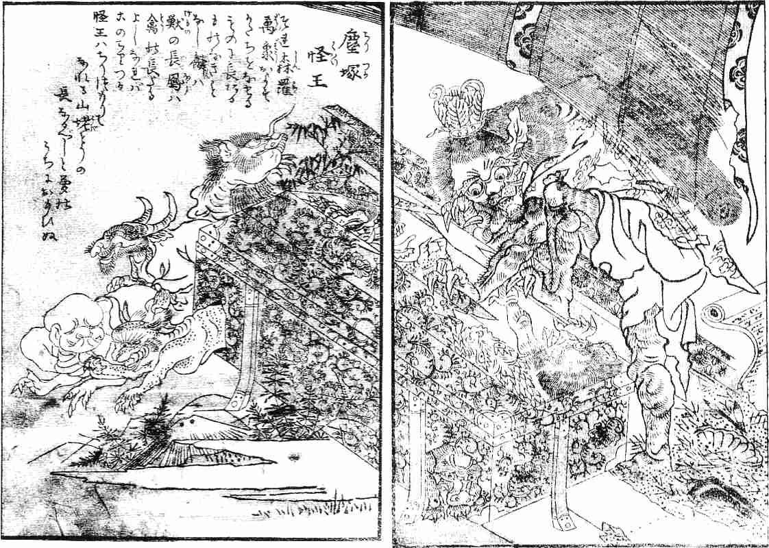 Chirizuka-kaiō (塵塚怪王) from the Gazu Hyakki Tsurezure Bukuro (百器徒然袋)